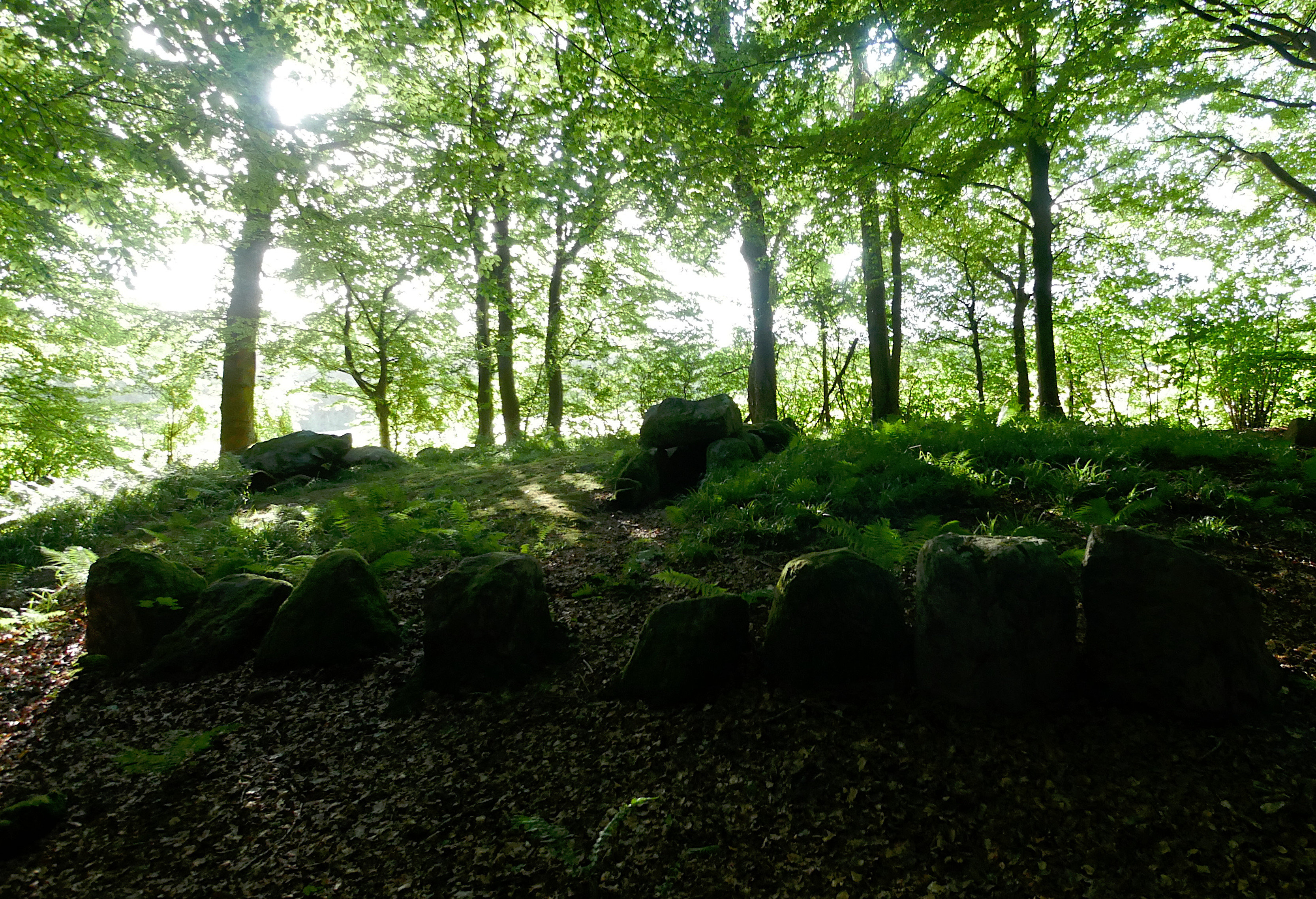 Der Langdysse von Sønder Stenderup (auch Midtskov Afdl. 82 genannt) liegt im Midtskov (mittlerer Wald), östlich von Kolding in Jütland in Dänemark. Er stammt aus der Jungsteinzeit etwa 3500 bis 2800 v. Chr. und ist eine Megalithanlage der Trichterbecherkultur (TBK). Das etwa einen Meter hohe Nordwest-Südost orientierte Hünenbett des Langdysse mit zwei querliegenden, 1942 restaurierten Dolmenkammern ist etwa 21,0 m lang und 9,0 m breit. Die Randsteine (38) sind nahezu vollständig erhalten. Die Kammern haben beide die gleiche Form. Ein Endstein im Norden, zwei seitliche Tragsteine im Osten und Westen, zwei Gangsteinpaare (ohne Decksteine) und ein Deckstein auf der Kammer.